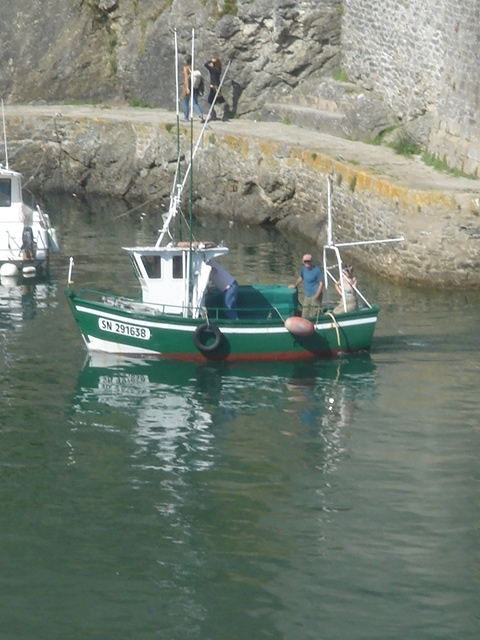 Petit chalutier avec un couple de pêcheurs dans le port de Palais (56)